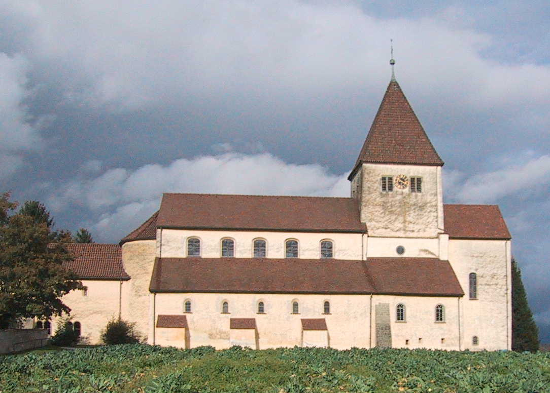 St. Georg (Reichenau), Südseite